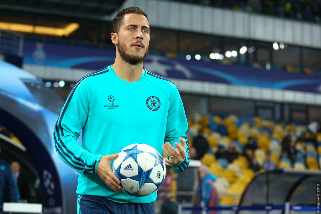 20.10.2015 Kyiv, Olimpiyskiy National Sports Complex Champions League. Group stage. FC Dynamo Kyiv - Chelsea - 0:0 Chelsea (4-2-3-1): Begovic; Zouma, Cahill, JT (c), Azpilicueta; Ramires, Matic; Willian, Fabregas (Oscar 75), Hazard; Diego Costa. Unused subs Blackman, Baba, Mikel, Traore, Kenedy, Falcao. Booked Zouma 67 Dynamo Kiev (4-1-4-1): Shovkovskiy; Danilo Silva, Khacheridi, Dragovic, Vida; Rybalka; Yarmolenko, Sydorchuk, Buyalskiy (Garmesh 83), Gonzalez; Kravets (Junior Moraes 78). Unused subs Rybka, Antunes, Petrovic, Gusev, Miguel Veloso. Booked Buyalskiy 65 20.10.2015 г.Киев. НСК "Олимпийский". Лига Чемпионов. Групповой этап Динамо — Челси 0:0 Динамо: Шовковский — Данило Силва, Драгович, Хачериди, Вида — Рыбалка, Буяльский (Гармаш, 83) — Ярмоленко, Сидорчук, Гонсалес — Кравец (Мораес, 78) Челси: Бегович — Аспиликуэта, Терри, Кэхилл, Зума — Матич, Рамирес — Виллиан, Фабрегас (Оскар, 75), Азар — Д. Коста Предупреждения: Буяльский — Зума